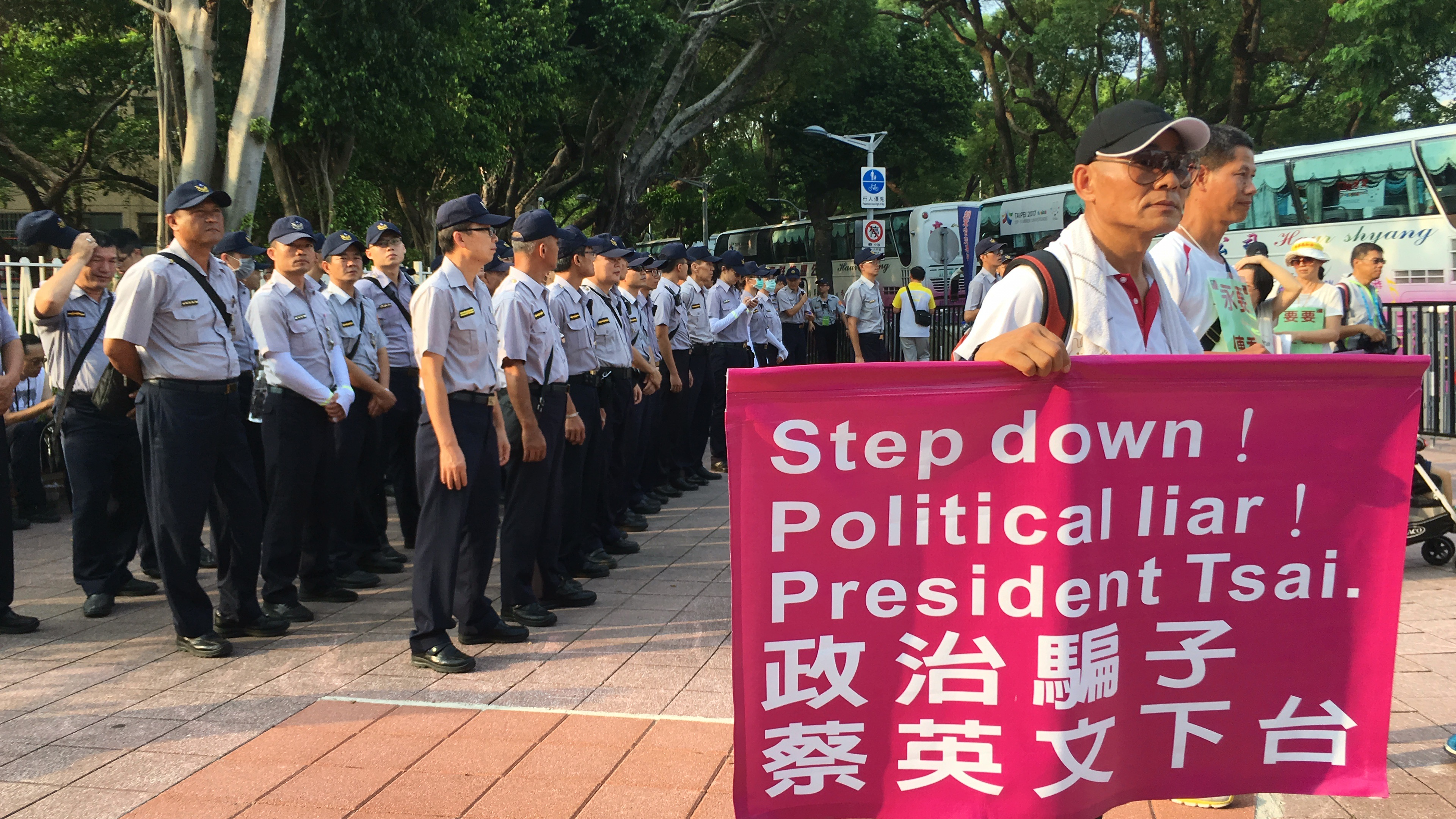 中文（中国大陆）: 抗议者阻挠2017台北世界大学运动会开幕式，手持标语“政治骗子蔡英文下台”。